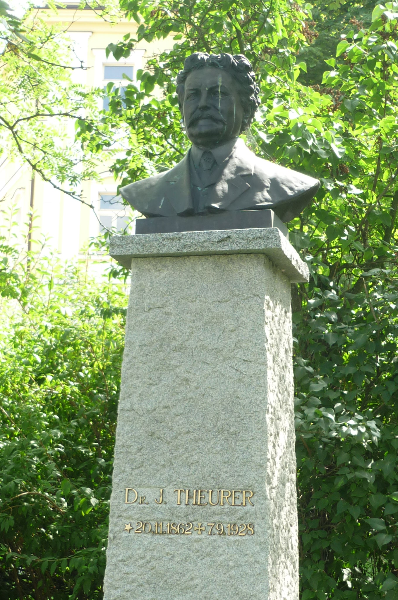 Büste von Dr. Theurer in Příbram (Pibrans), Rektor an der ehem. Bergakademie